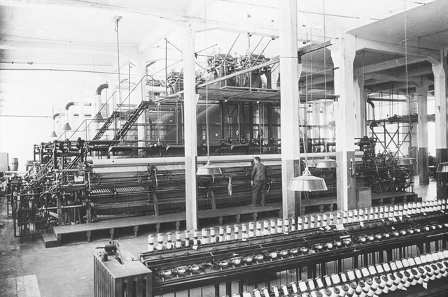 Dresden-Dobritz Dresdner Gardinen- und Spitzenmanufaktur – Gardinenmaschine